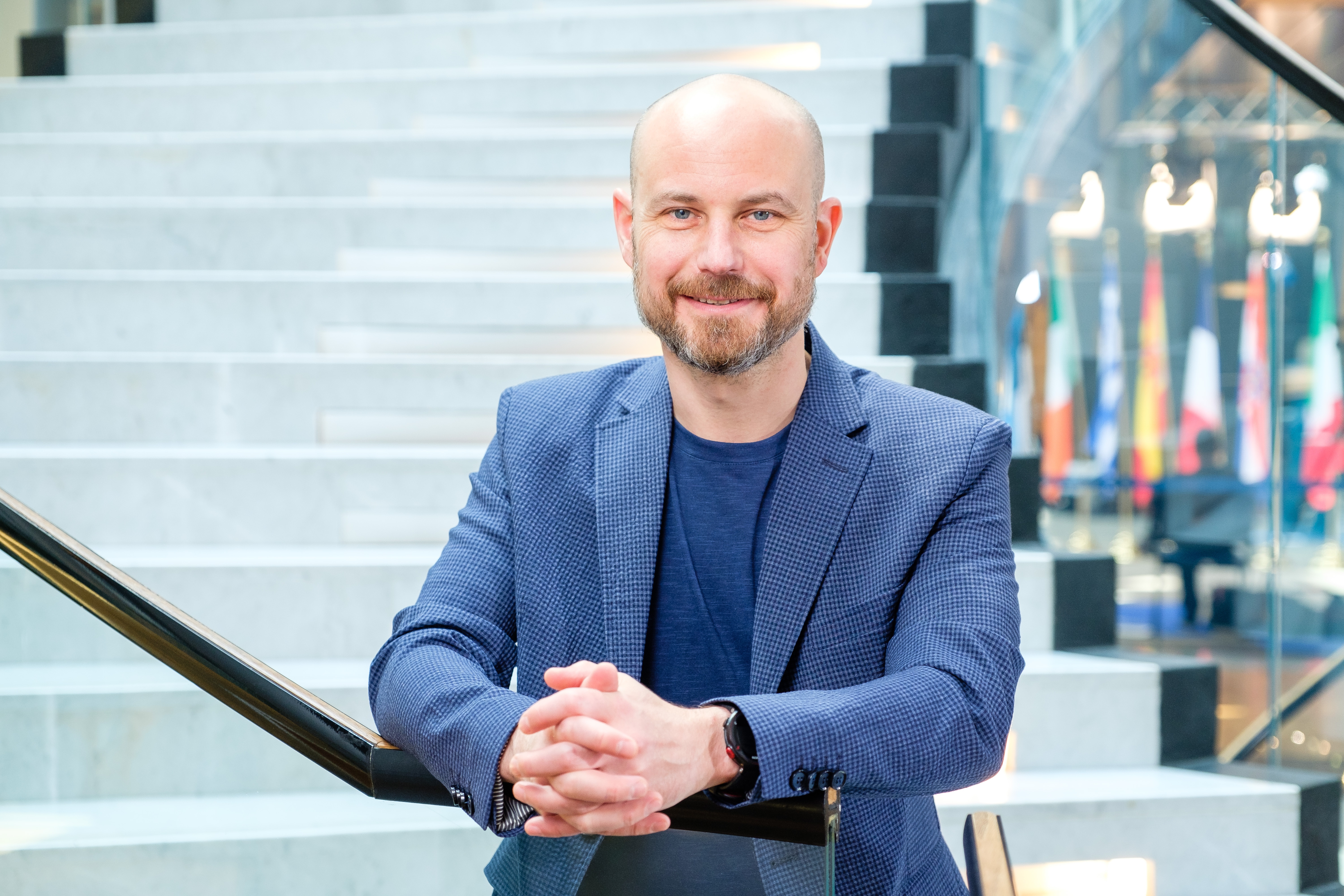 Vladimír Bilčík v Európskom parlamente